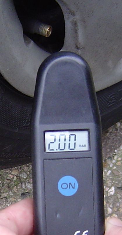 Een bandenspanningsmeter is een stuk gereedschap om de luchtdruk (bandenspanning) in de band van een voertuig te meten.